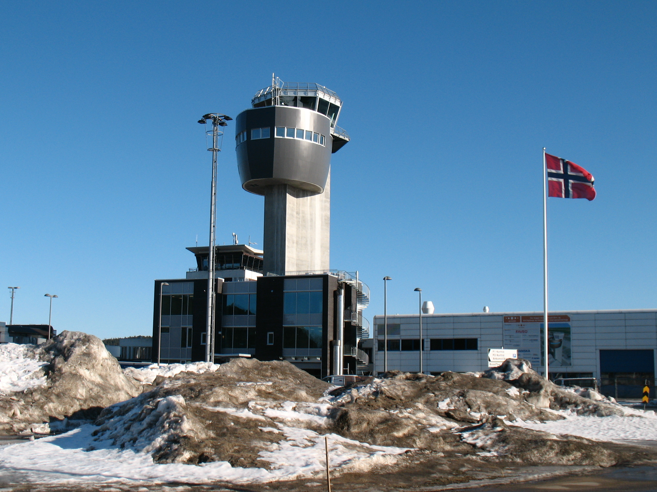 Tårnet på Kjevik flyplass.